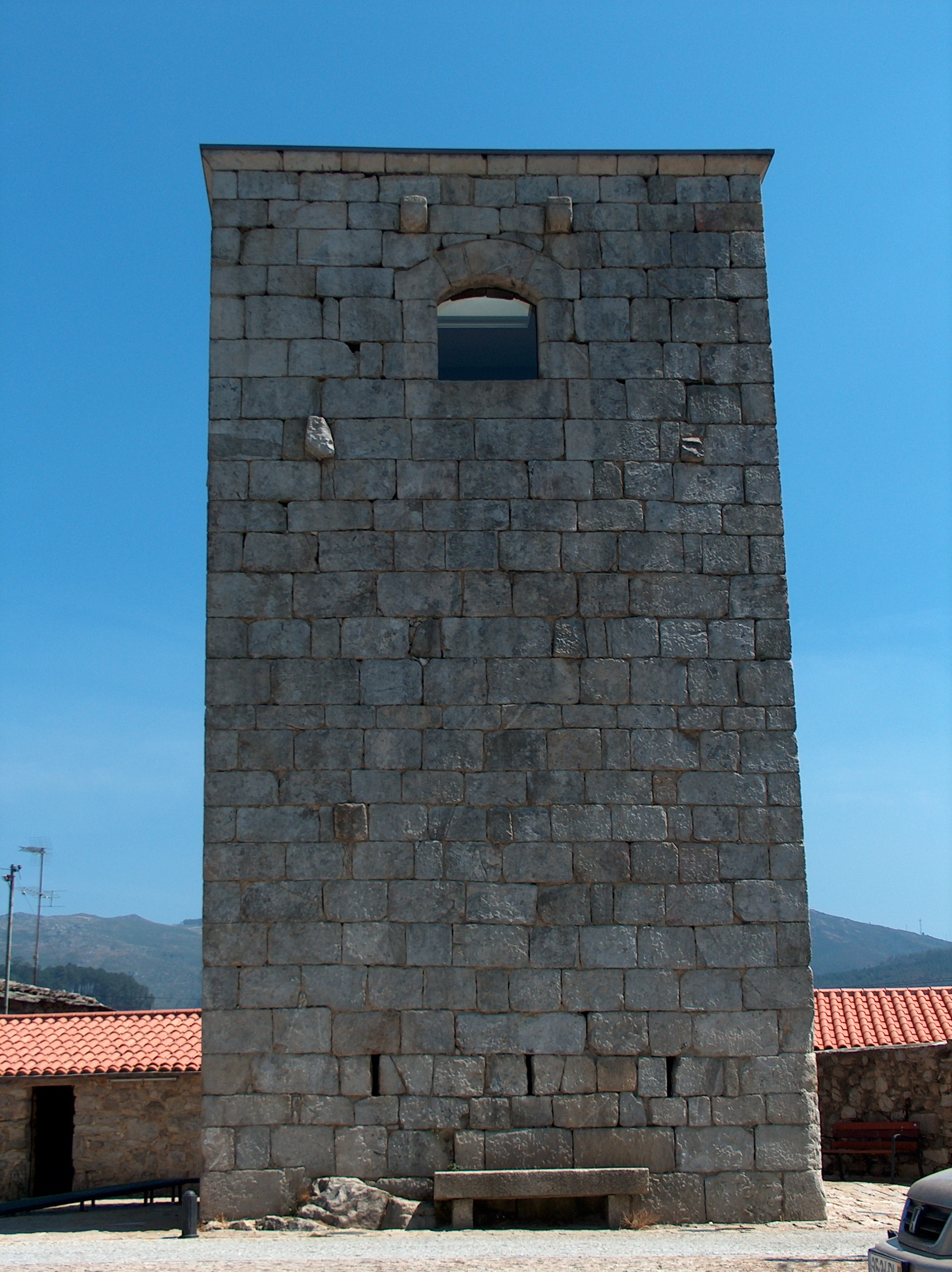 Torre de Alcofra, Alcofra, Vouzela - Portugal.